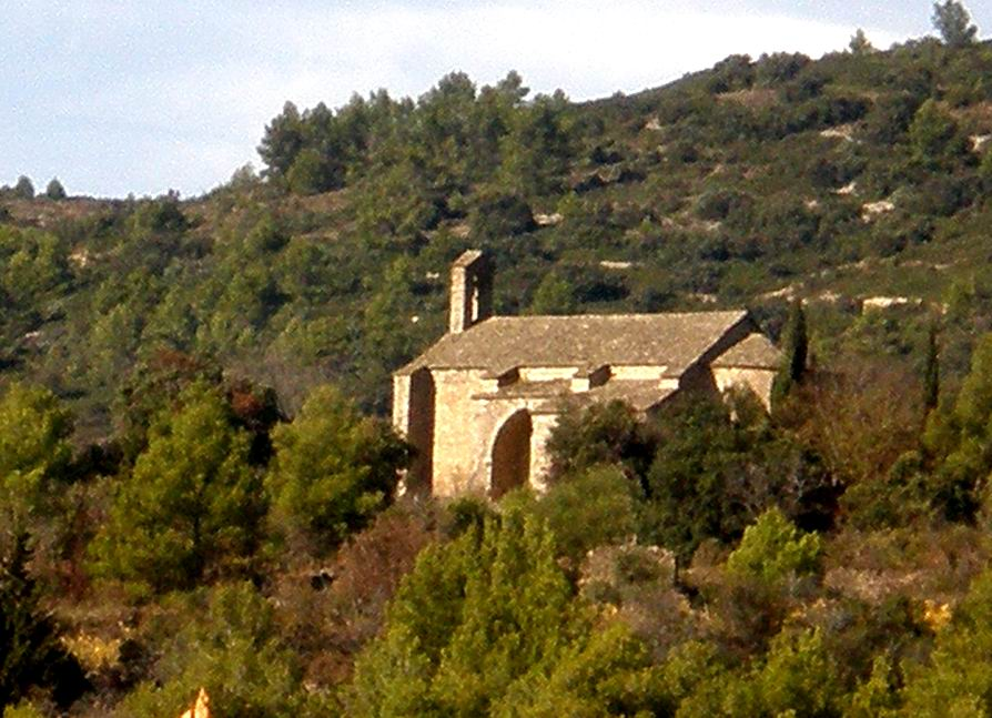 Chapelle de Centeilles à Siran (Hérault)